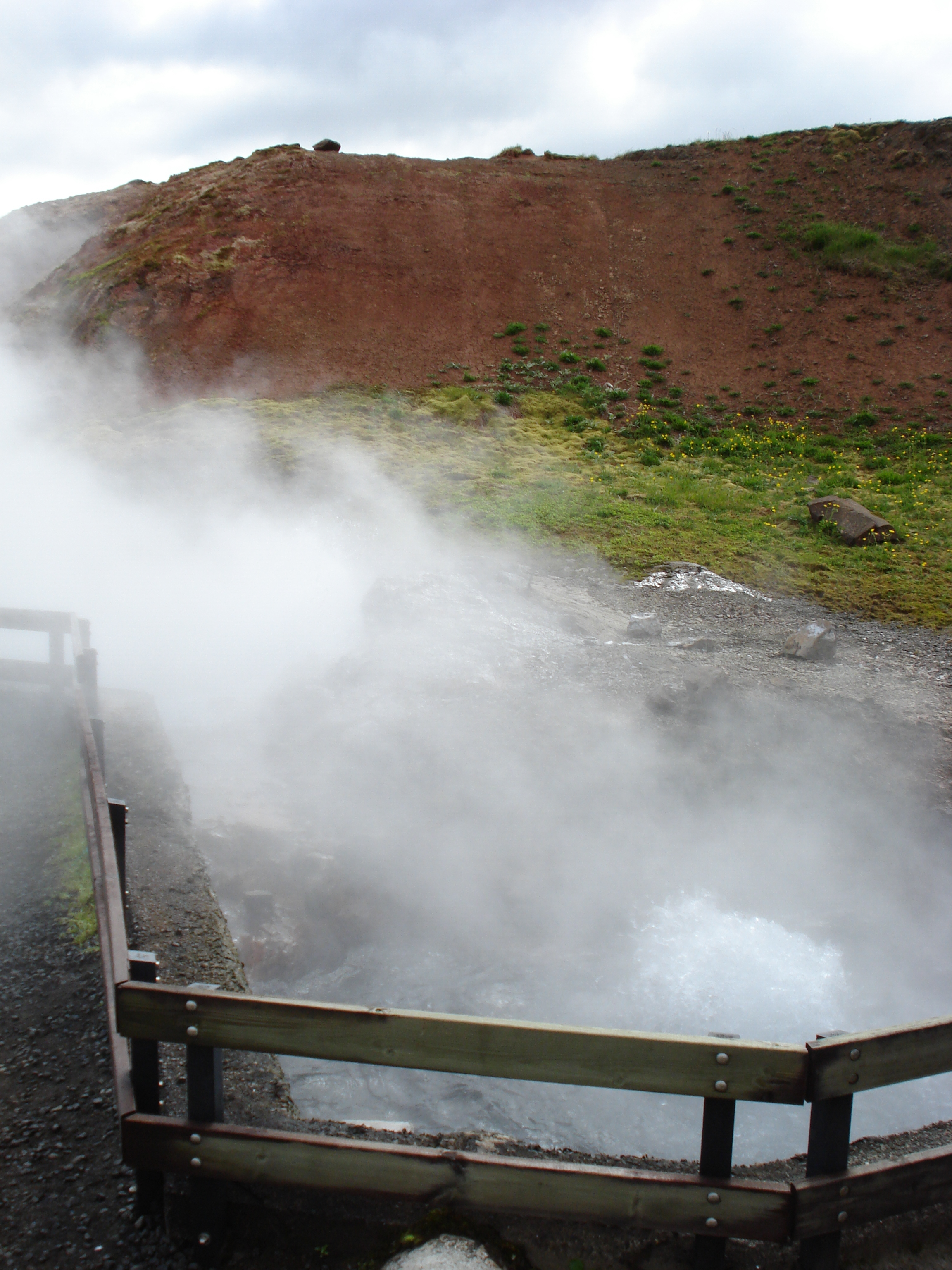 Deildartunga, Hot Spring Iceland